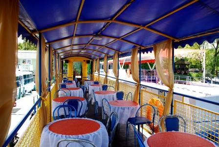 Аренда теплохода Киев